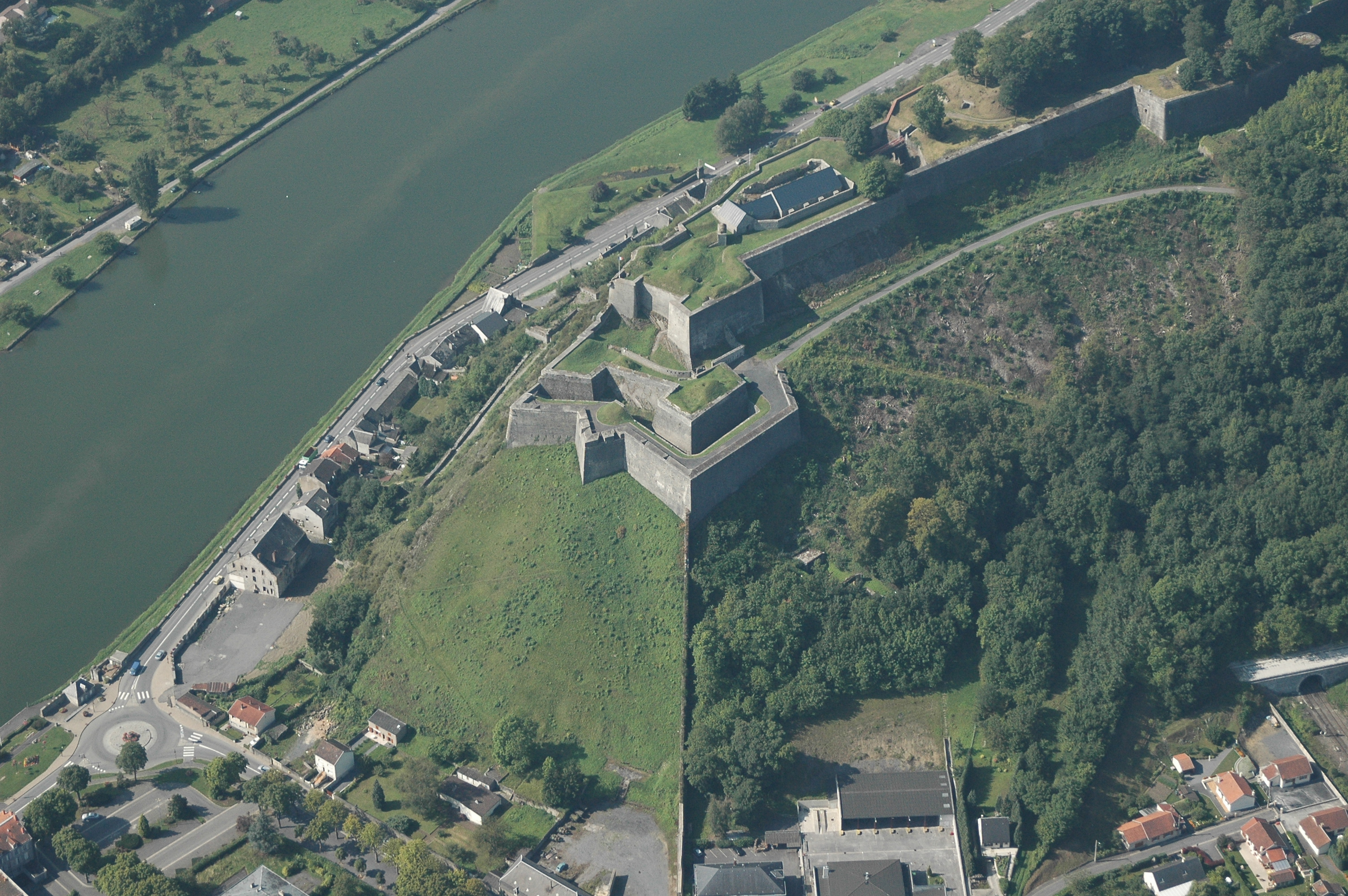 Dominant la ville, cette forteresse doit son nom à l'empereur Charles Quint. Sa construction nécessitera 3000 ouvriers auxquels s'ajouteront 20000 fantassins et 3000 cavaliers car ses murailles seront élevées au cours d'actions militaires.